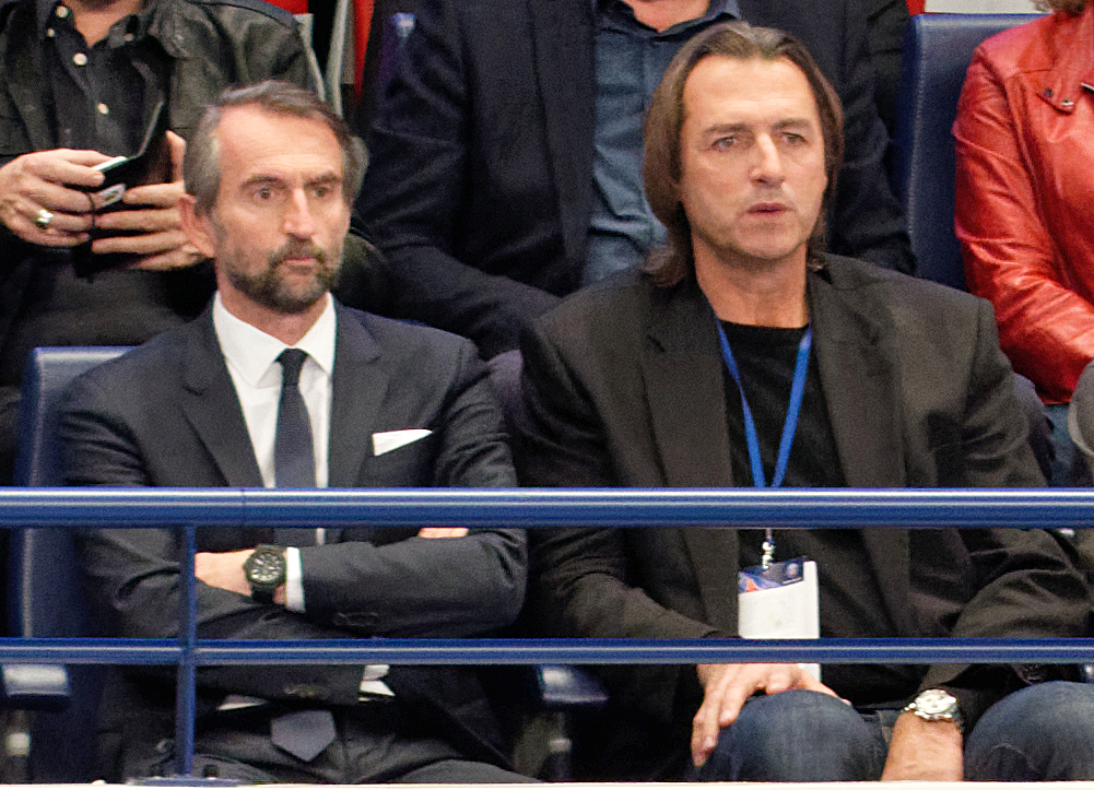 Rencontre de championnat de LidlStarLigue entre le PSG et St Raphaël. A Coubertin, le 8 décembre 2016.